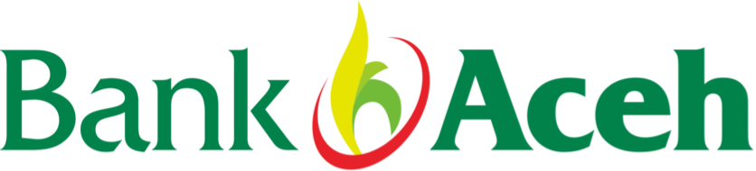 Hak cipta dan karya atas gambar logo ini sepenuhnya milik PT. Bank Aceh Syariah, logo ini digunakan untuk keperluan PT. Bank Aceh Syariah